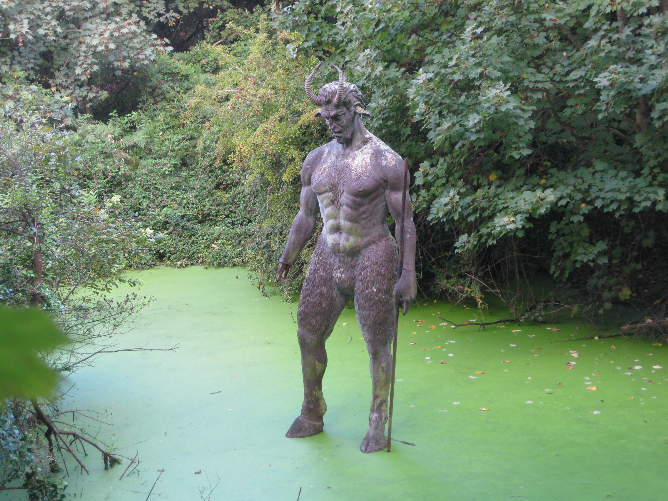 Nrf: La statue du Dgiâbl'ye au Creux du Vis, Jèrri